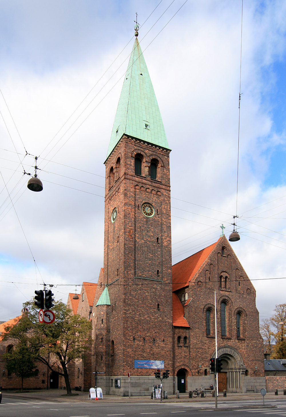 Sankt Andreas Kirke, København.